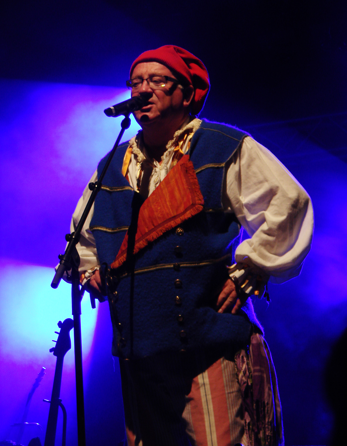 Tri Yann, à l'Aymon Folk Festival, Bogny-sur-Meuse, le 4/08/2007: Jean Chocun.